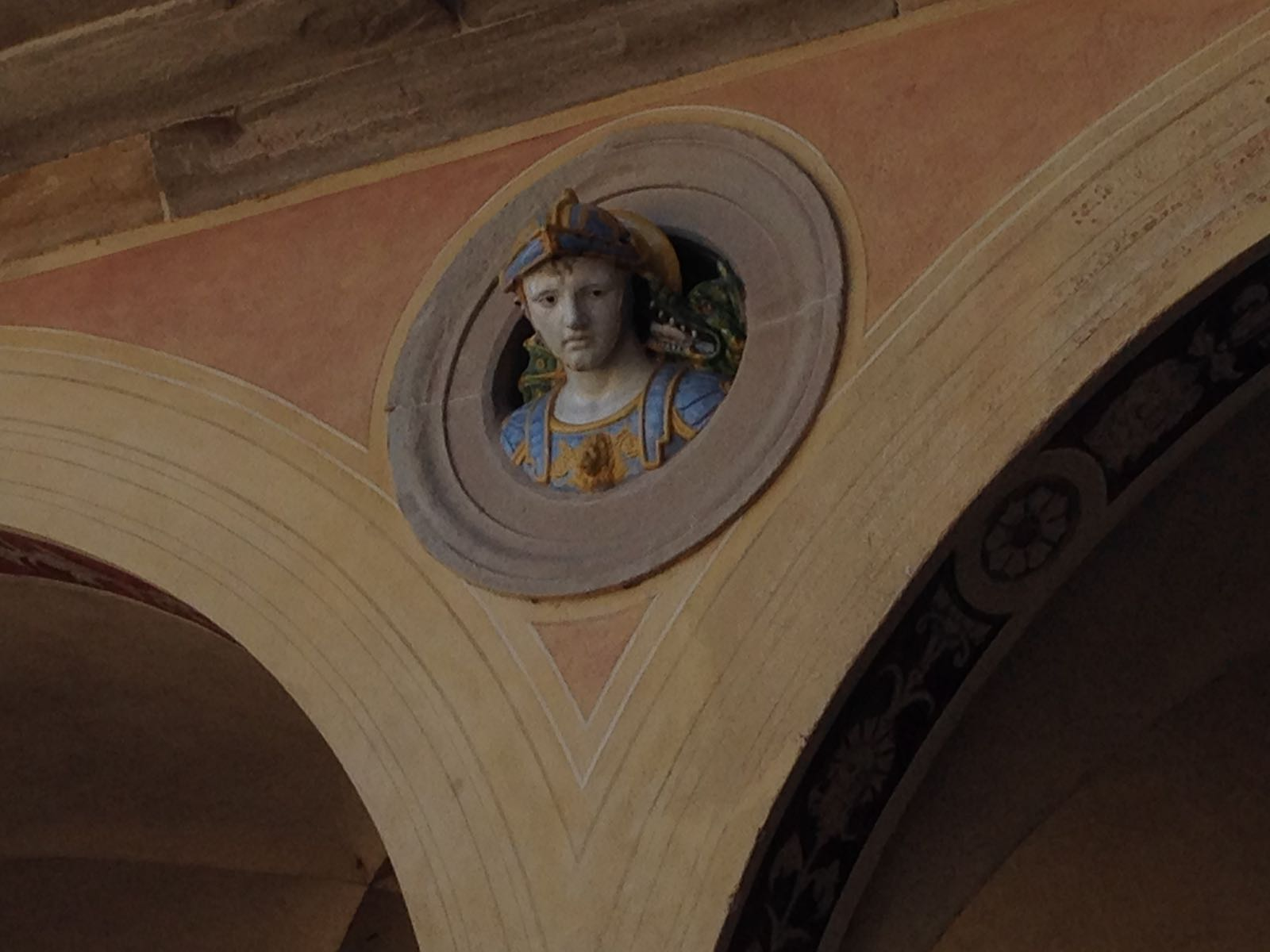 Busto con san Giorgio, Chiostro grande della Certosa